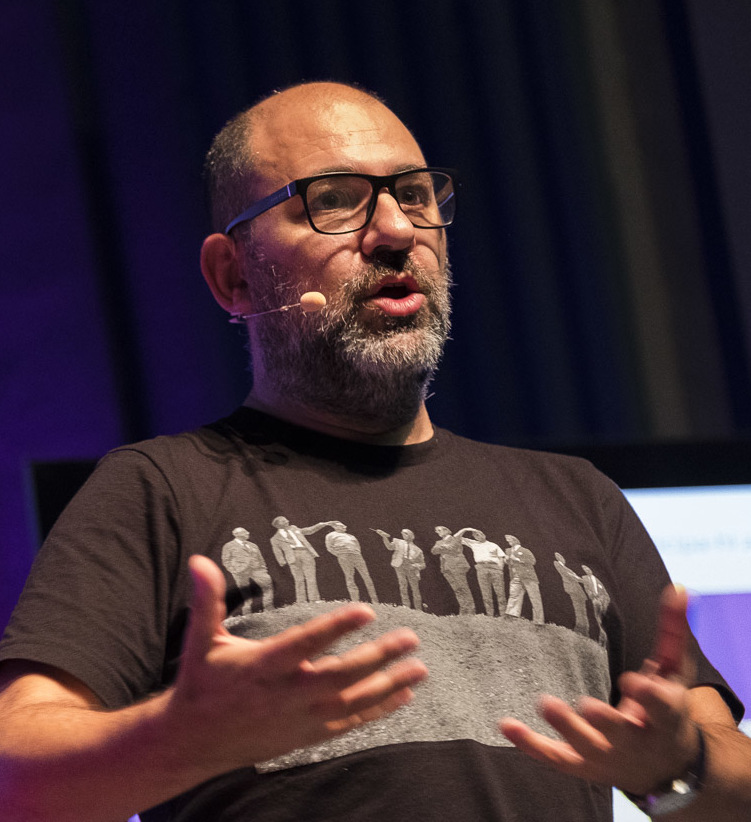 Catosfera 20 d'octubre 2017